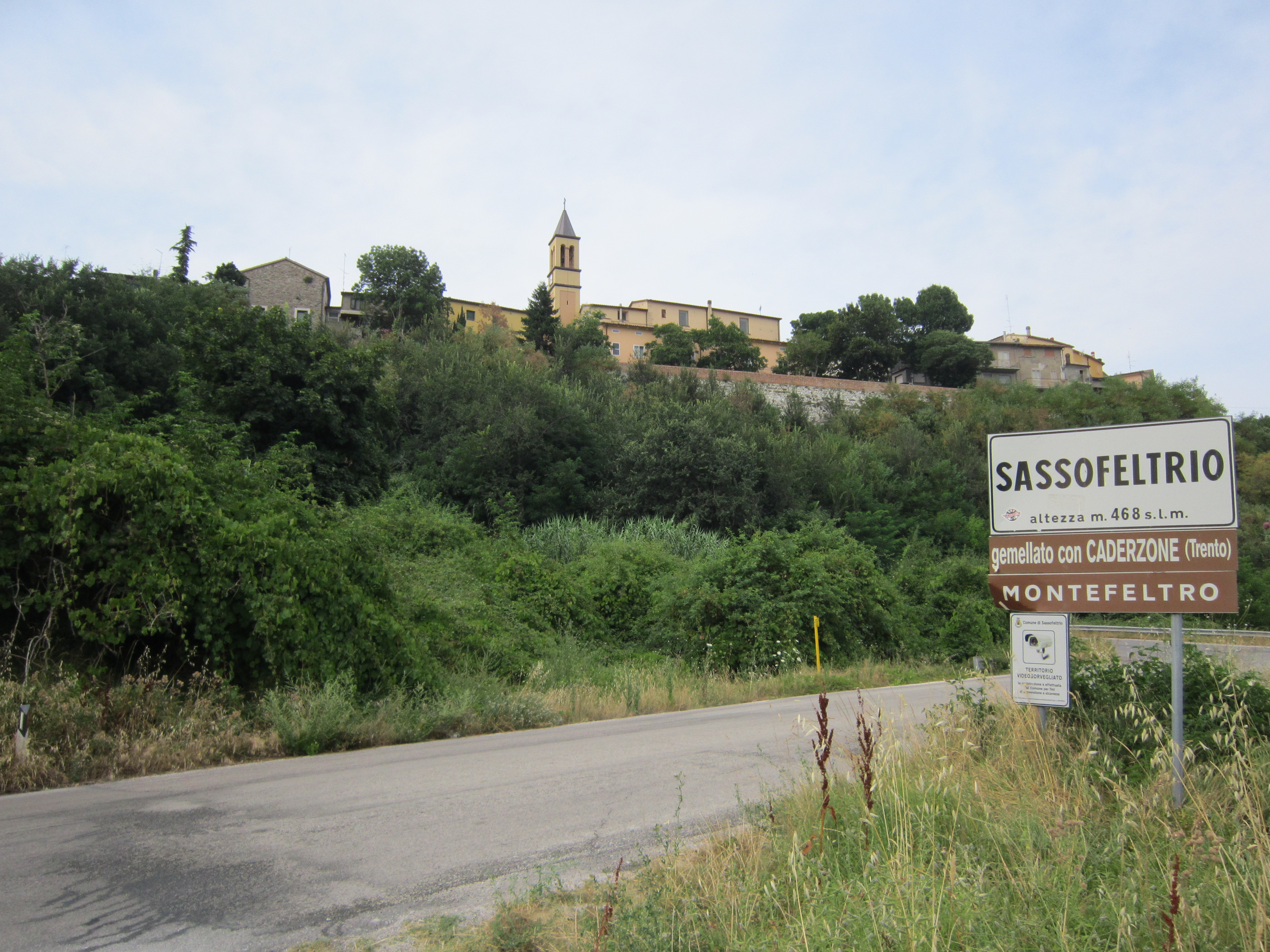 Vista dal basso di Sassofeltrio (luglio 2015)